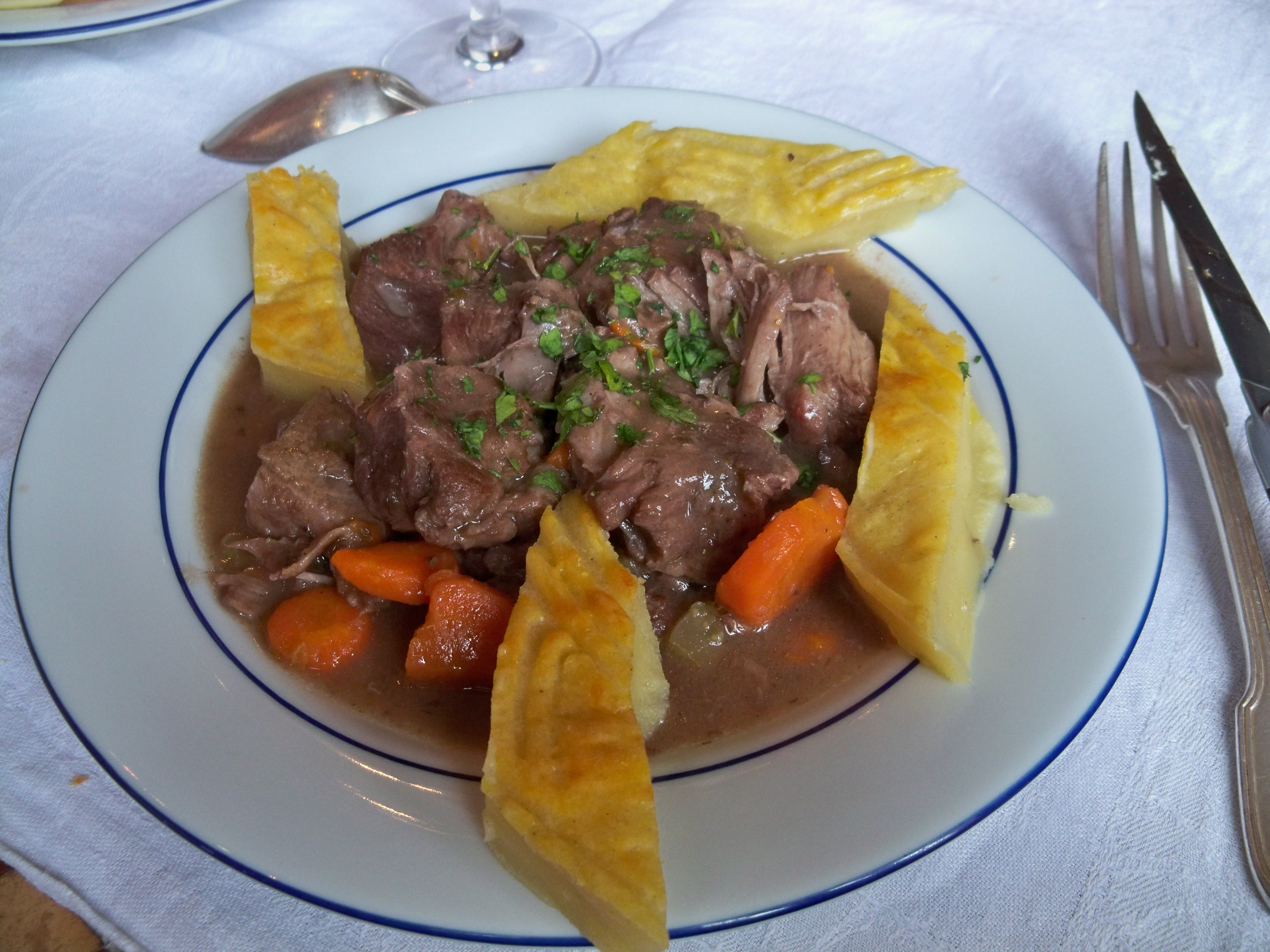 daube de boeuf